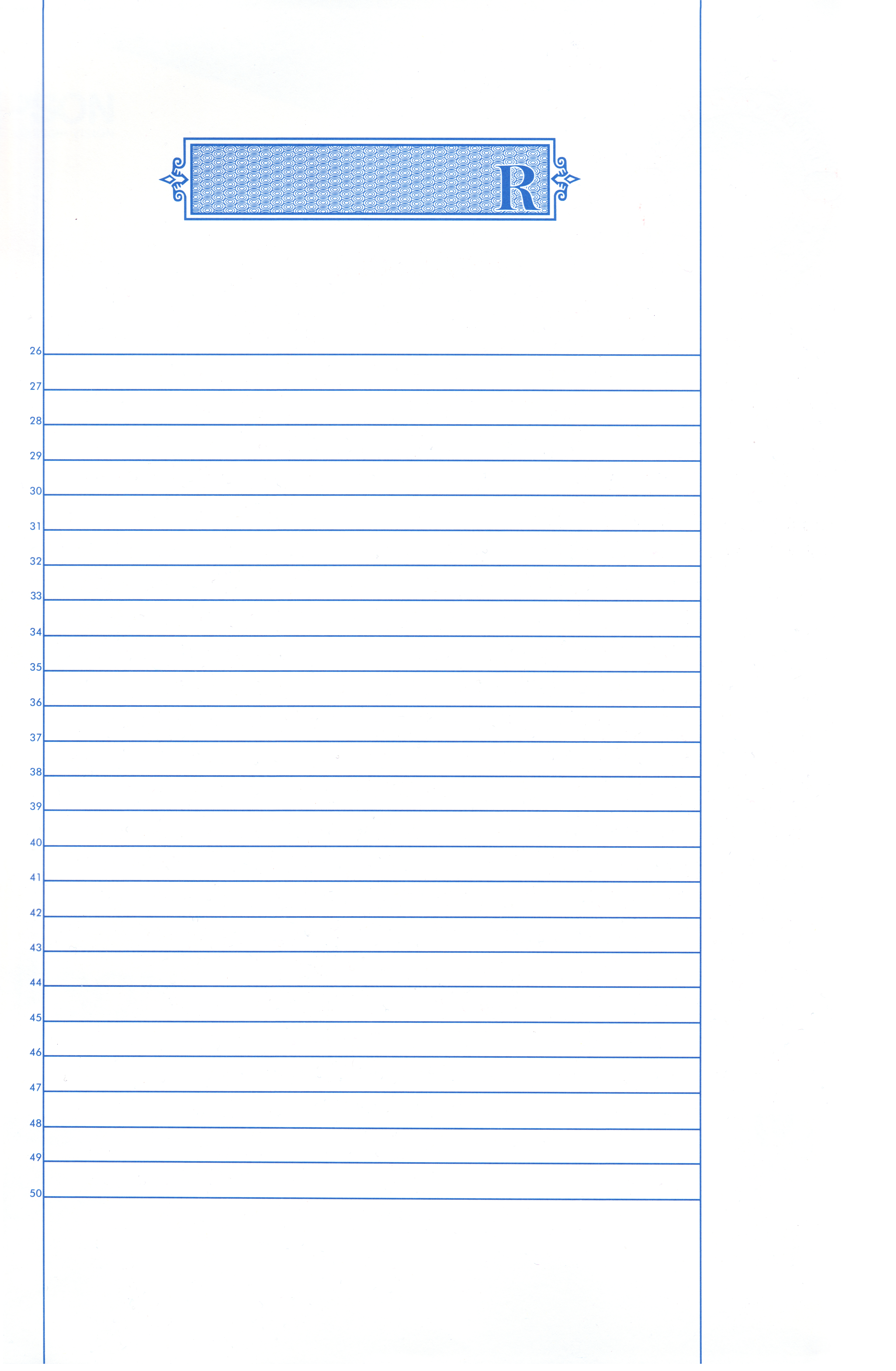 Parte trasera Hoja de protocolo para uso didáctico